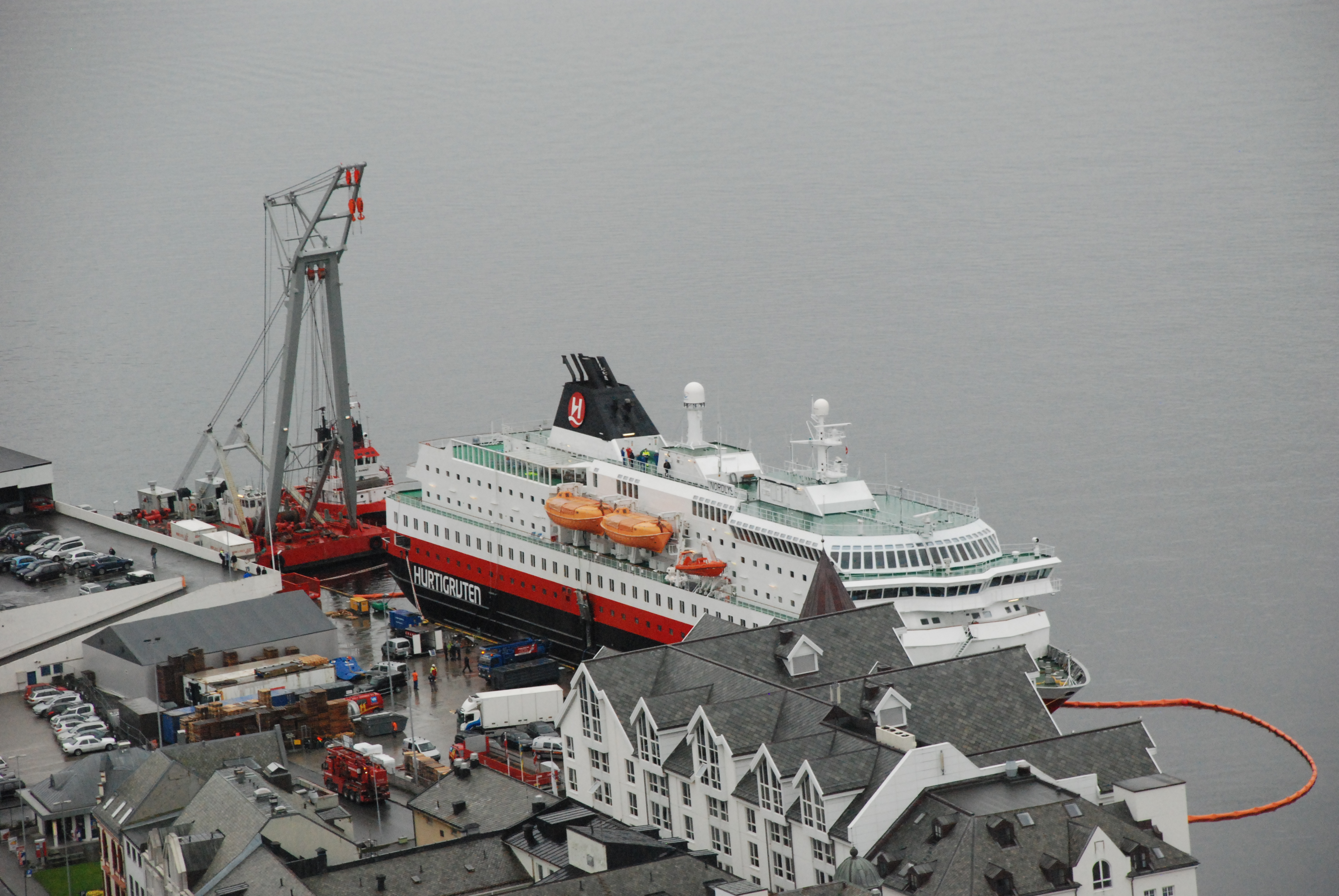 Die havarierte Nordlys im Hafen von Ålesund, Ölsperren und Schwimmkran